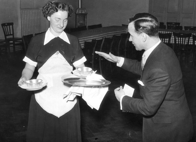 Hotelfachschule in Weinheim, Schloß Johannisburg